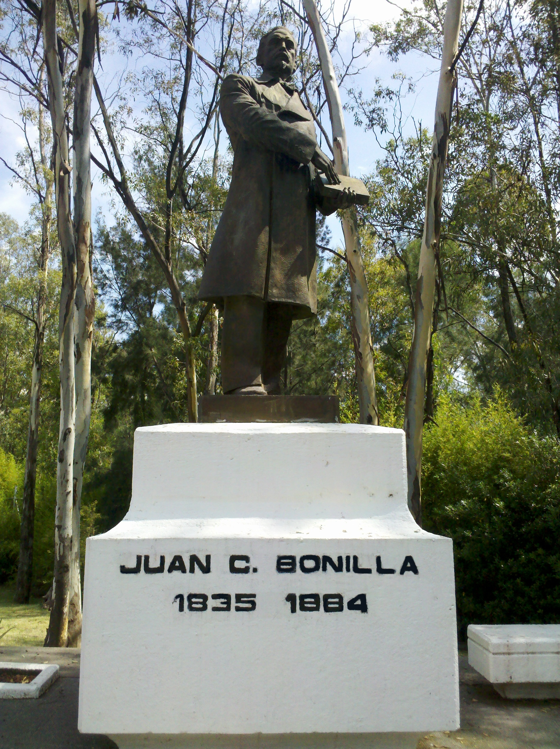 Estatua de Juan C. Bonilla, Puebla, México. Zona de Los Fuertes.